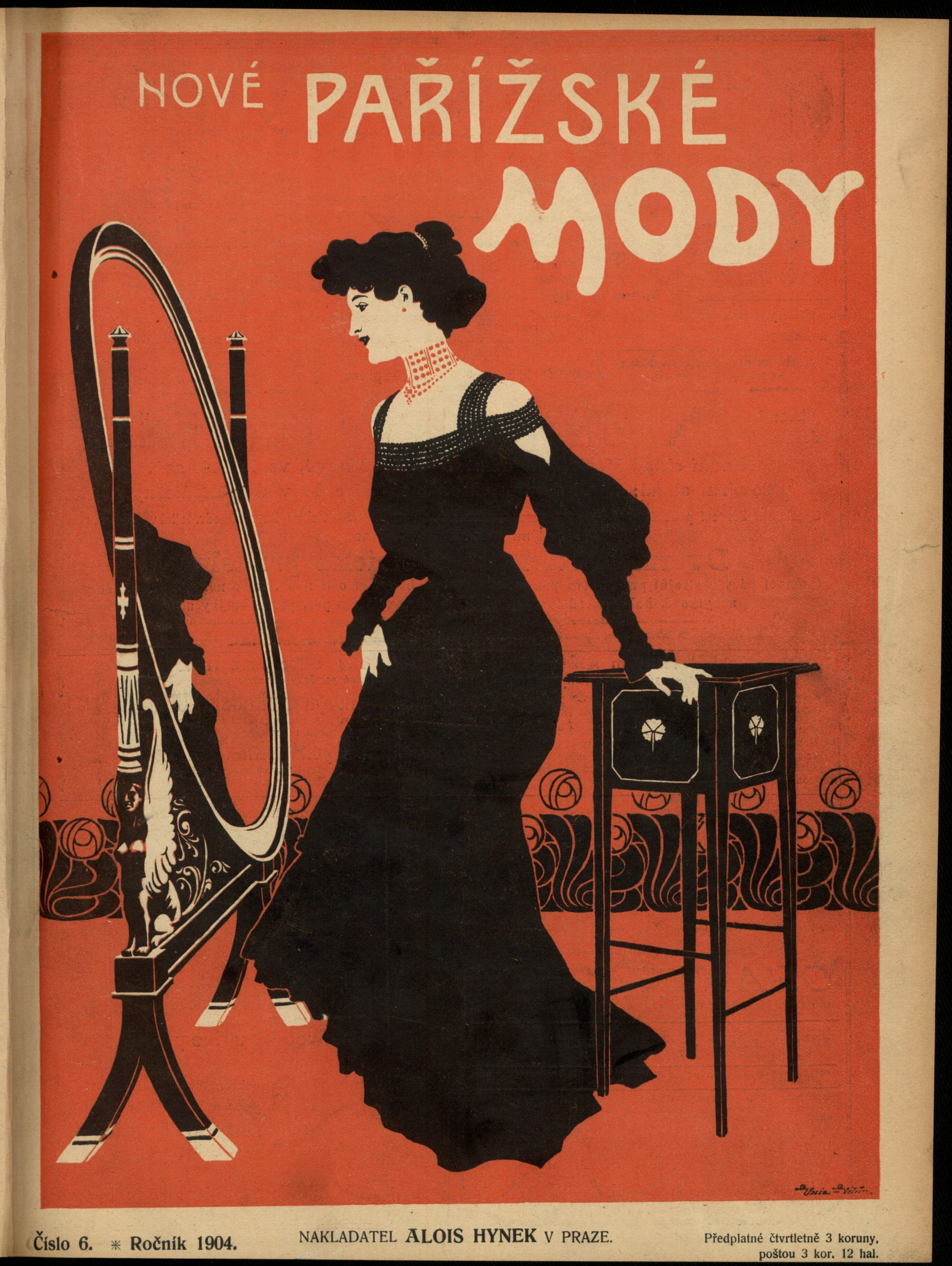 Nové pařížské módy, 1904 obálka